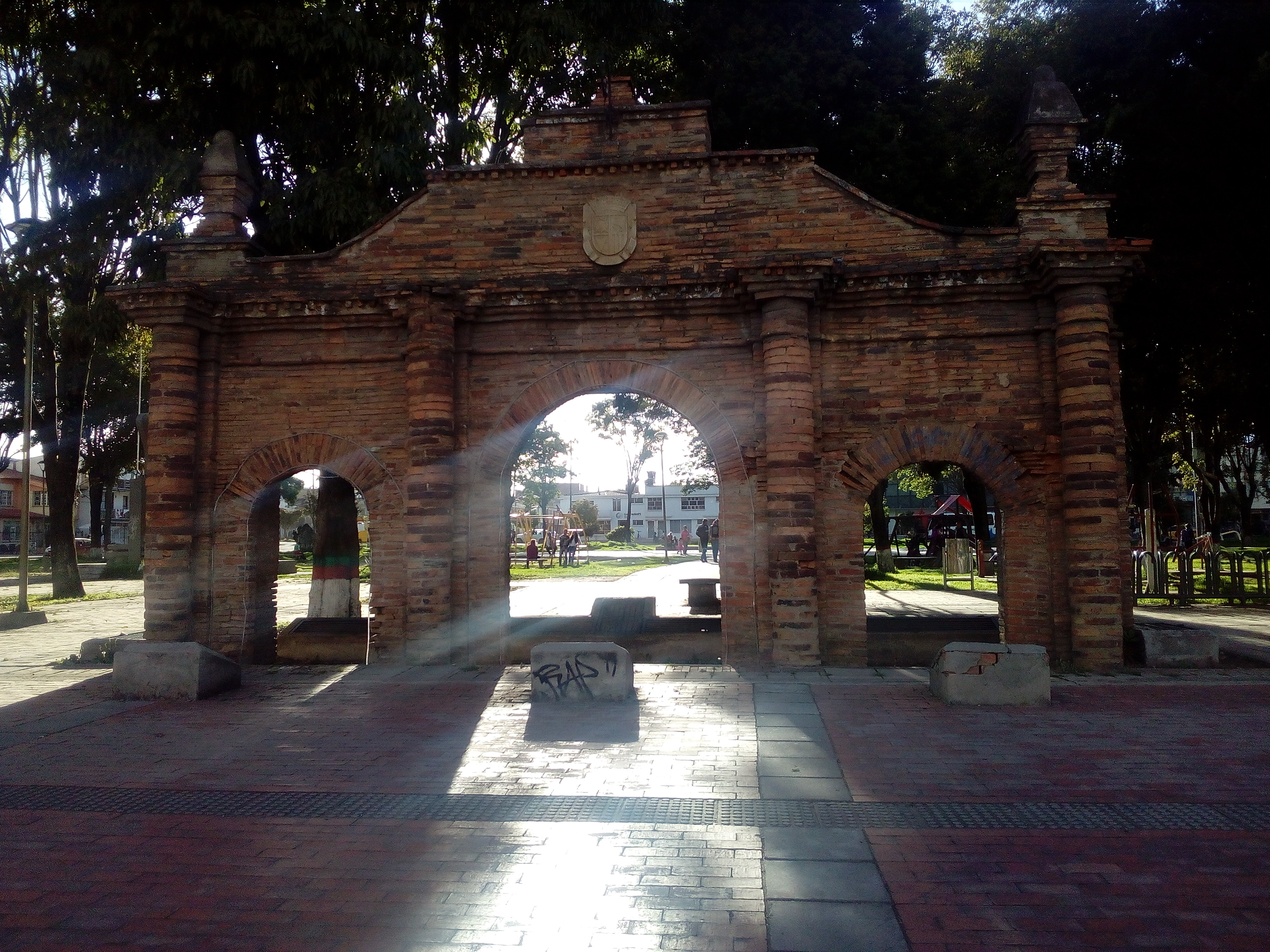 Entrada al parque el laguito